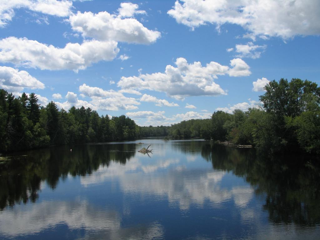 Rivière Coulonge, Québec, Canada